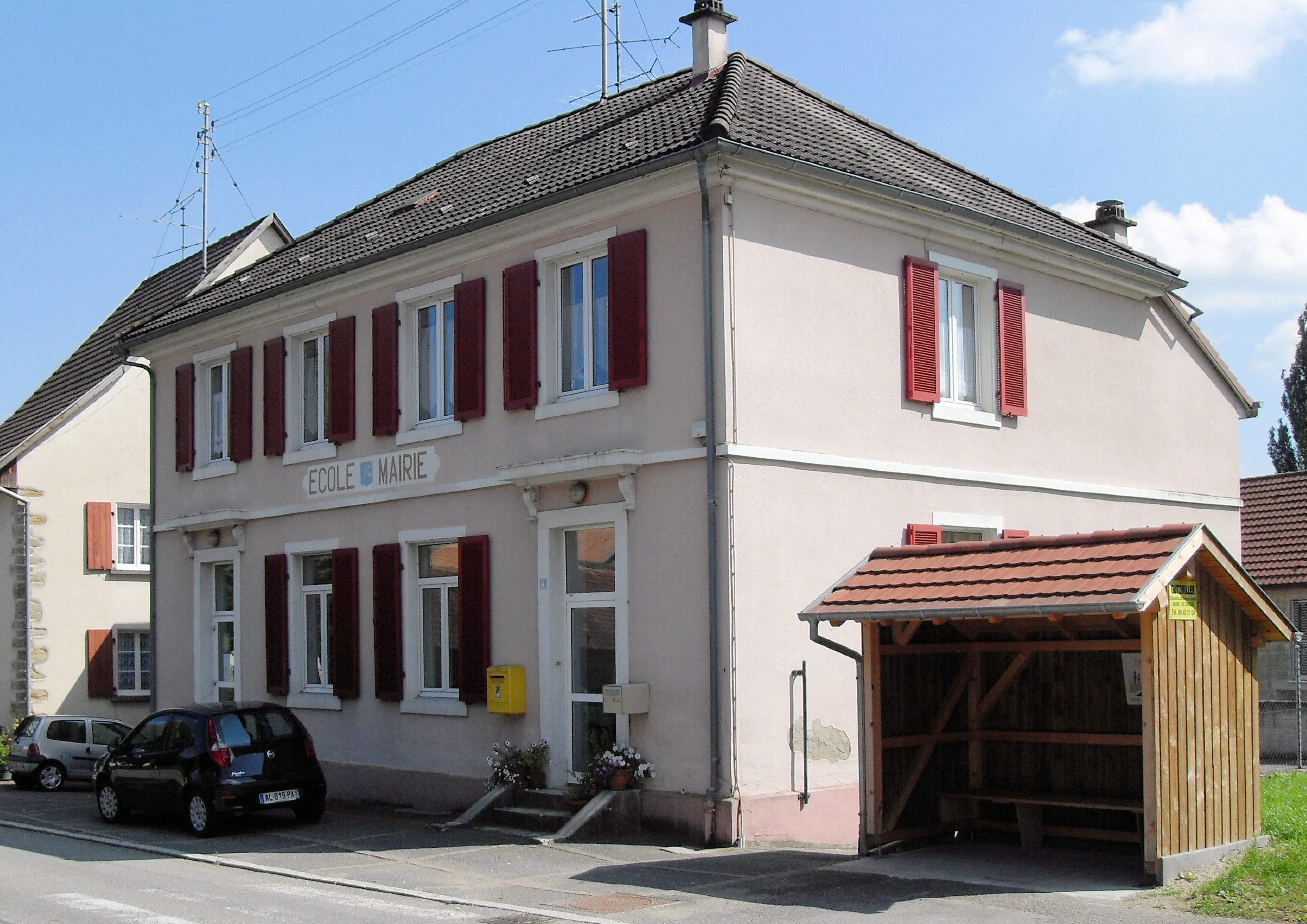 La mairie-école de Liebenswiller